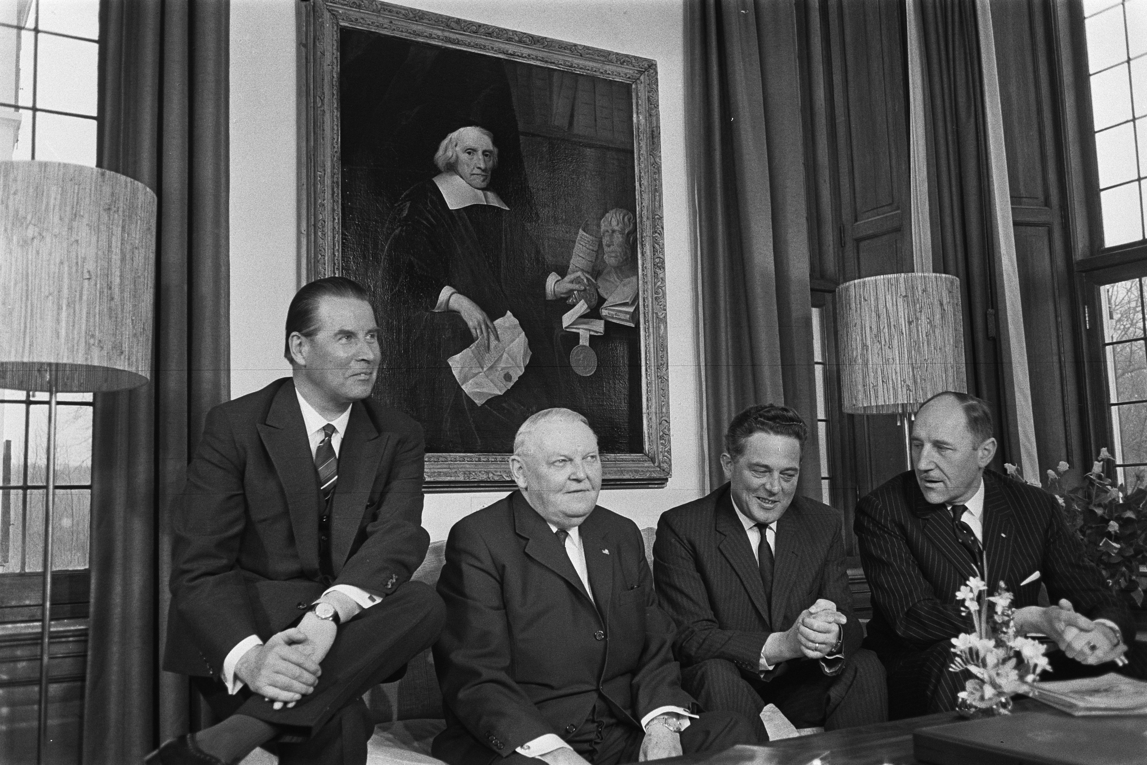 Collectie / Archief : Fotocollectie Anefo Reportage / Serie : [ onbekend ] Beschrijving : Bondskanselier Ludwig Erhard in Holland, bondskanselier Erhard bracht bezoek aan Catshuis v.l.n.r. dr. Gerard Schroder , prof. L. Erhard , minister / Datum : 2 maart 1964 Trefwoorden : bondskanseliers Persoonsnaam : Erhard Ludwig Instellingsnaam : Catshuis Fotograaf : Pot, Harry / Anefo Auteursrechthebbende : Nationaal Archief Materiaalsoort : Negatief (zwart/wit) Nummer archiefinventaris : bekijk toegang 2.24.01.05 Bestanddeelnummer : 916-1263